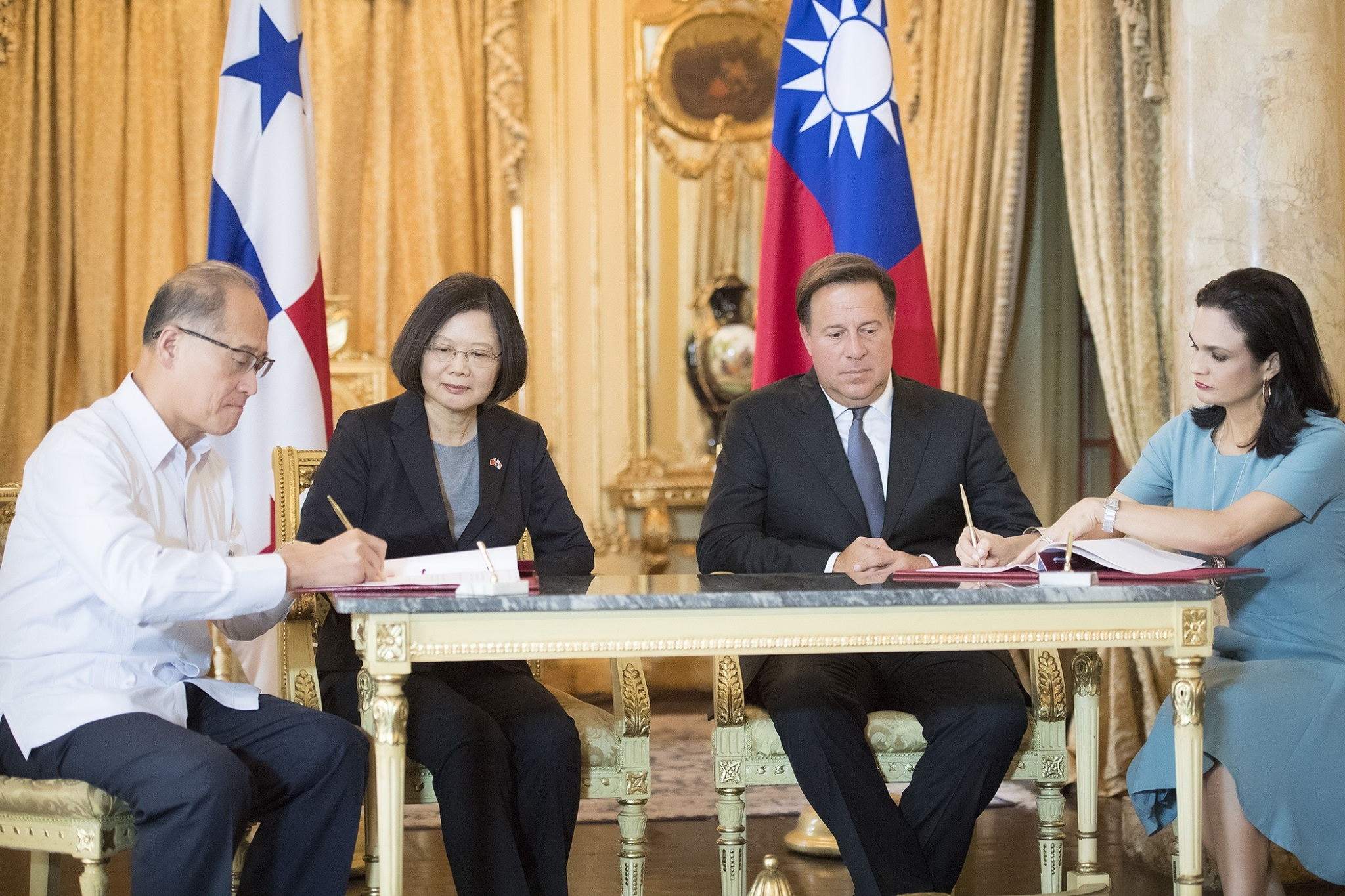 Taiwan’s Minister of Foreign Affairs David T. Lee and Panama’s Vice President and concurrently serving Minister of Foreign Affairs Isabel de Saint Malo de Alvarado sign a cooperative agreement regarding immigration affairs and human trafficking prevention in the Presidential Palace’s Salon Amarillo, witnessed by President Tsai and President Juan Carlos Varela Rodríguez. (2016/06/27) El Ministro de Relaciones Exteriores taiwanés, David T. Lee, y la Vicepresidenta y Ministra de Relaciones Exteriores de Panamá, Isabel de Saint Malo de Alvarado, firman un acuerdo de cooperación sobre asuntos de inmigración y prevención de la trata de personas en el Salón Amarillo del Palacio Presidencial, en presencia de la Presidenta Tsai y el Presidente panameño Juan Carlos Varela Rodríguez. (2016/06/27) 授權方式及範圍：中華民國總統府│政府網站資料開放宣告 Authorization Method & Scope: Office of the President, Republic of China (Taiwan) | Government Website Open Information Announcement